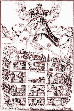 Dibujo realizado por Francisco Tito Yupanqui publicado en El mundo desde Potosí. Vida y reflexiones de Bartolomé Arzans de Orsúa y Vela (1676-1736)